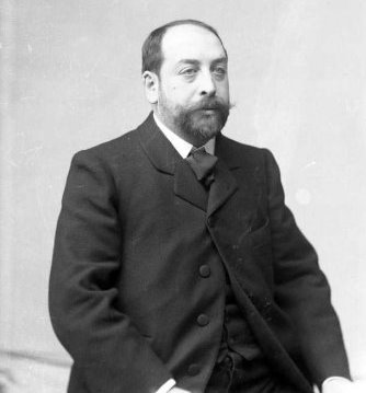 Retrat de bust del polític i dramaturg Manuel Linares-Rivas y Astray-Canedda.